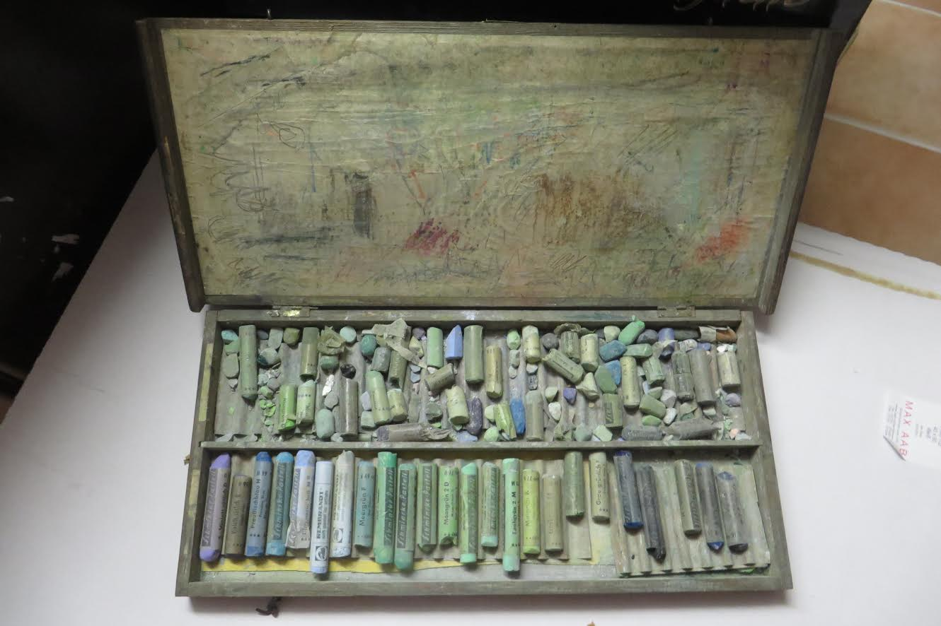 Das ist ein original Schmincke-Pastellkasten, leider sind nicht mehr alle Originalfarben vorhanden.